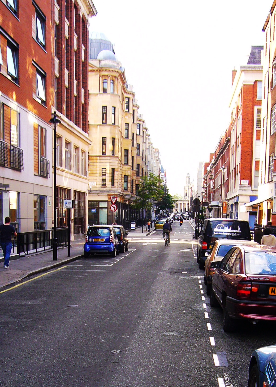 vista on Bolsover Street in Westminster, London